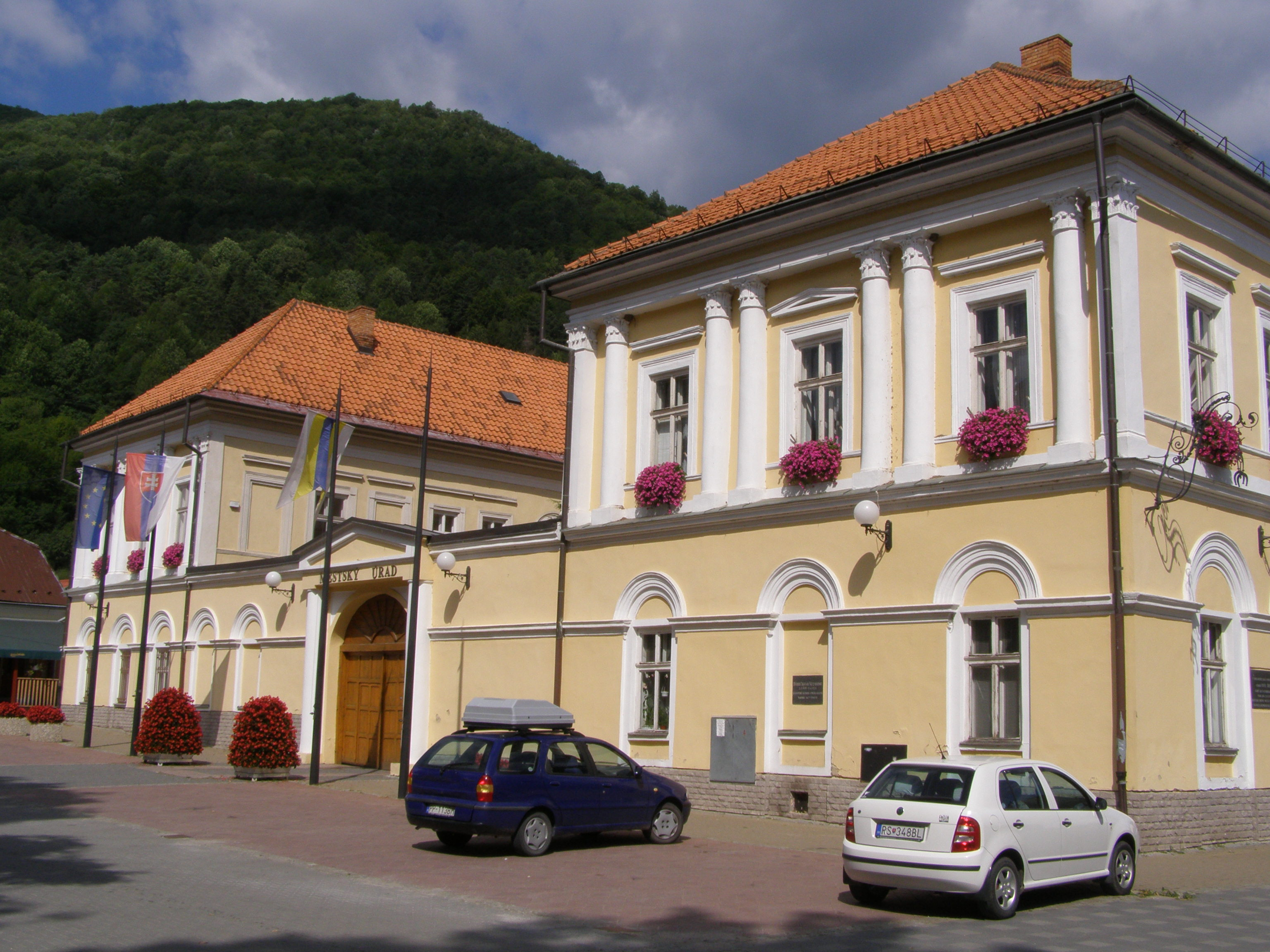 Tisovec (okres Rimavská Sobota), Městký úřad